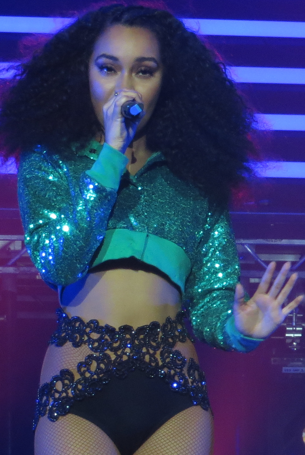 Little Mix 6